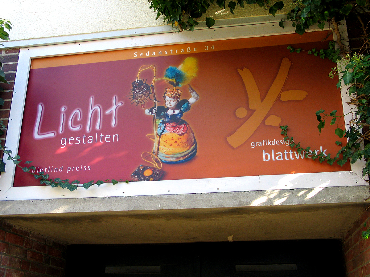 "Licht gestalten" wirbt die Schaufläche über dem Zugang zum Wohn- und Arbeitsatelier der Künstlerin Dietlind Preiss in der Sedanstraße 34 in Hannover-List. Hier findet sich auch die Design-Werkstatt grafikdesign blattwerk ...